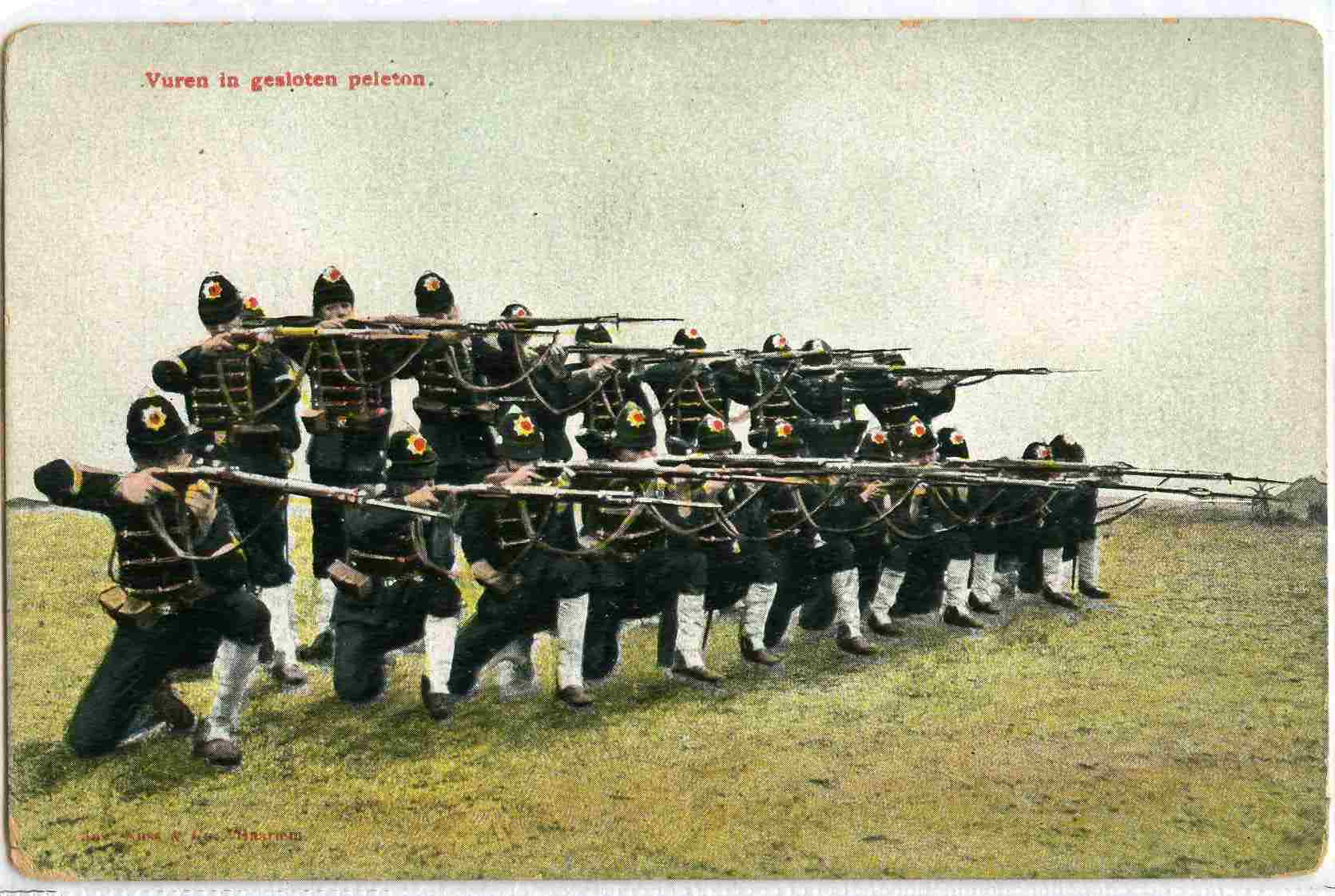 Korps Koloniale Reserve uit Nijmegen. Vuren in gesloten peloton, ca. 1905